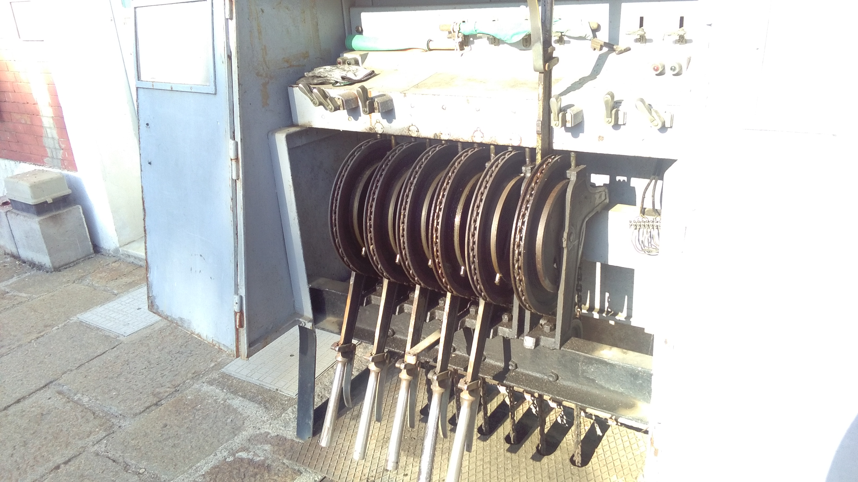 Leve per il controllo dei deviatoi, poste sul muro del fabbricato viaggiatori della stazione di Mandas.